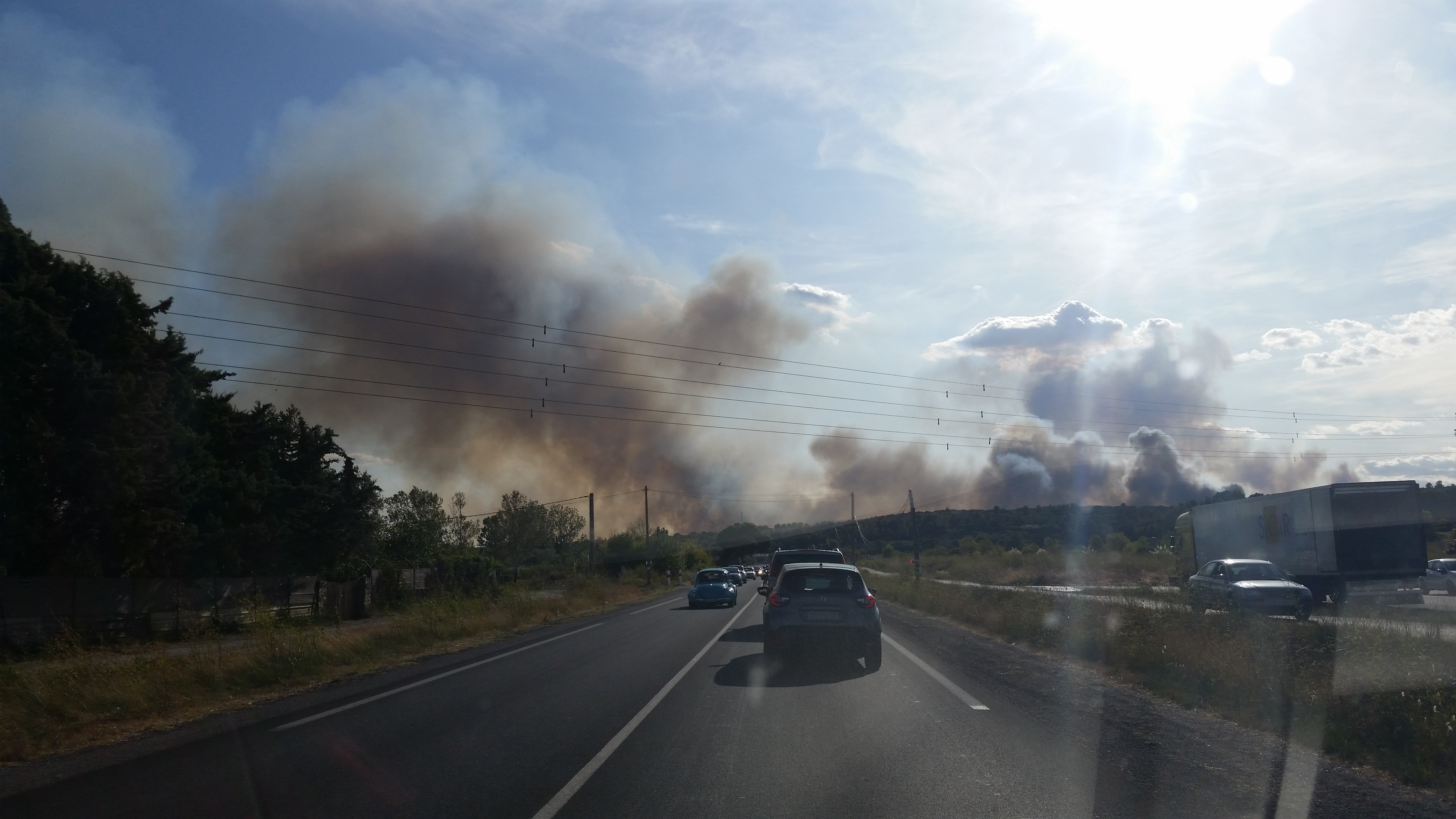 Feu de forêt à Loupian sept 2019